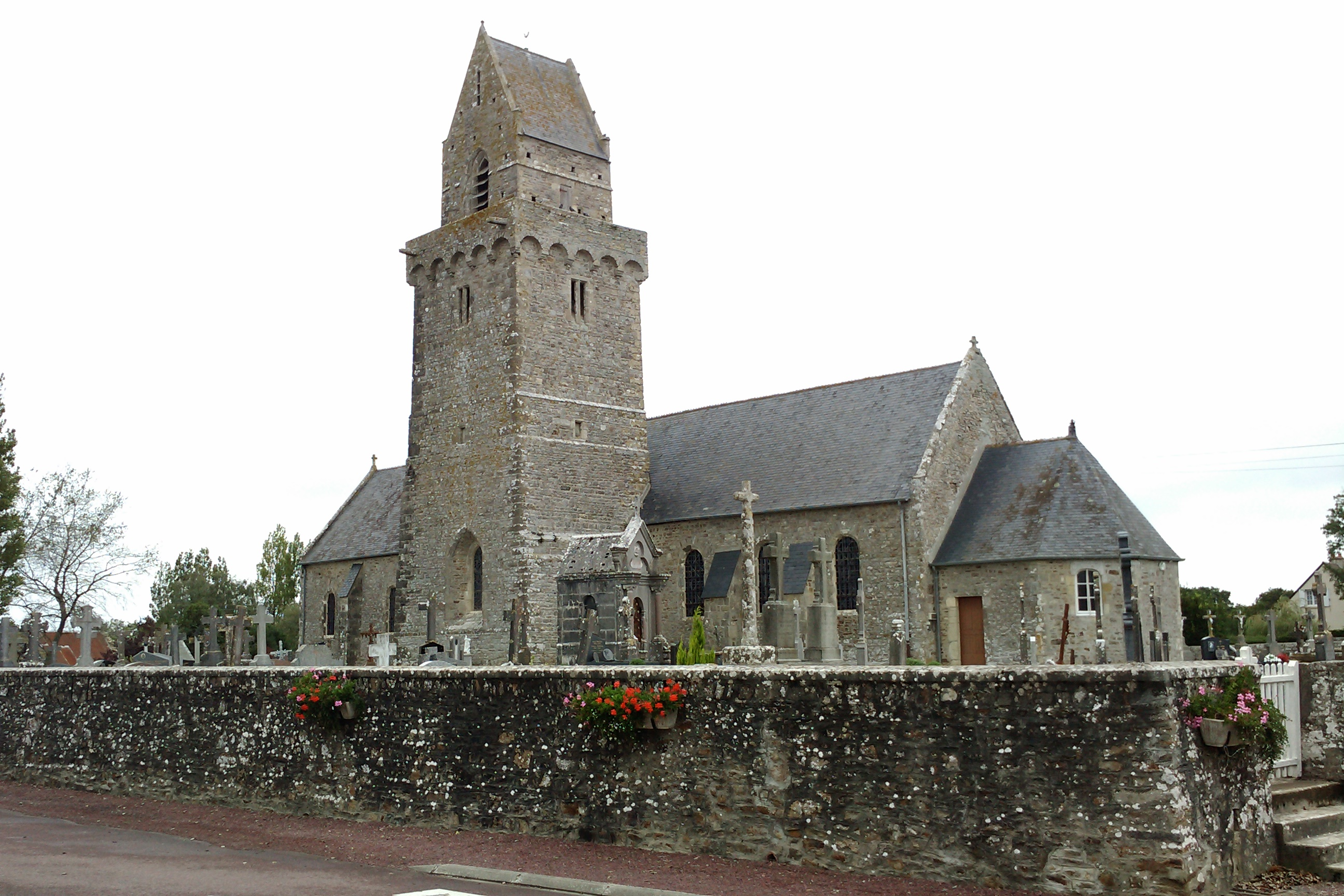 église de Saint-Nicolas-de-Pierrepont Clocher fortifié du XIVe